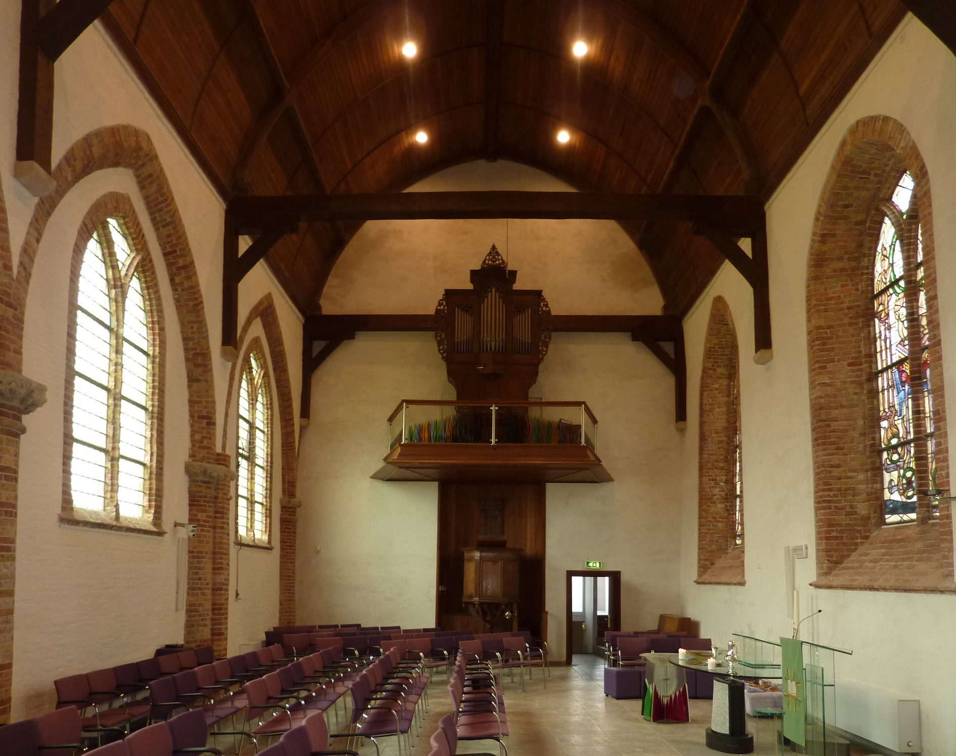 Zicht op een deel van het interieur van de Catharinakerk in Zoutelande